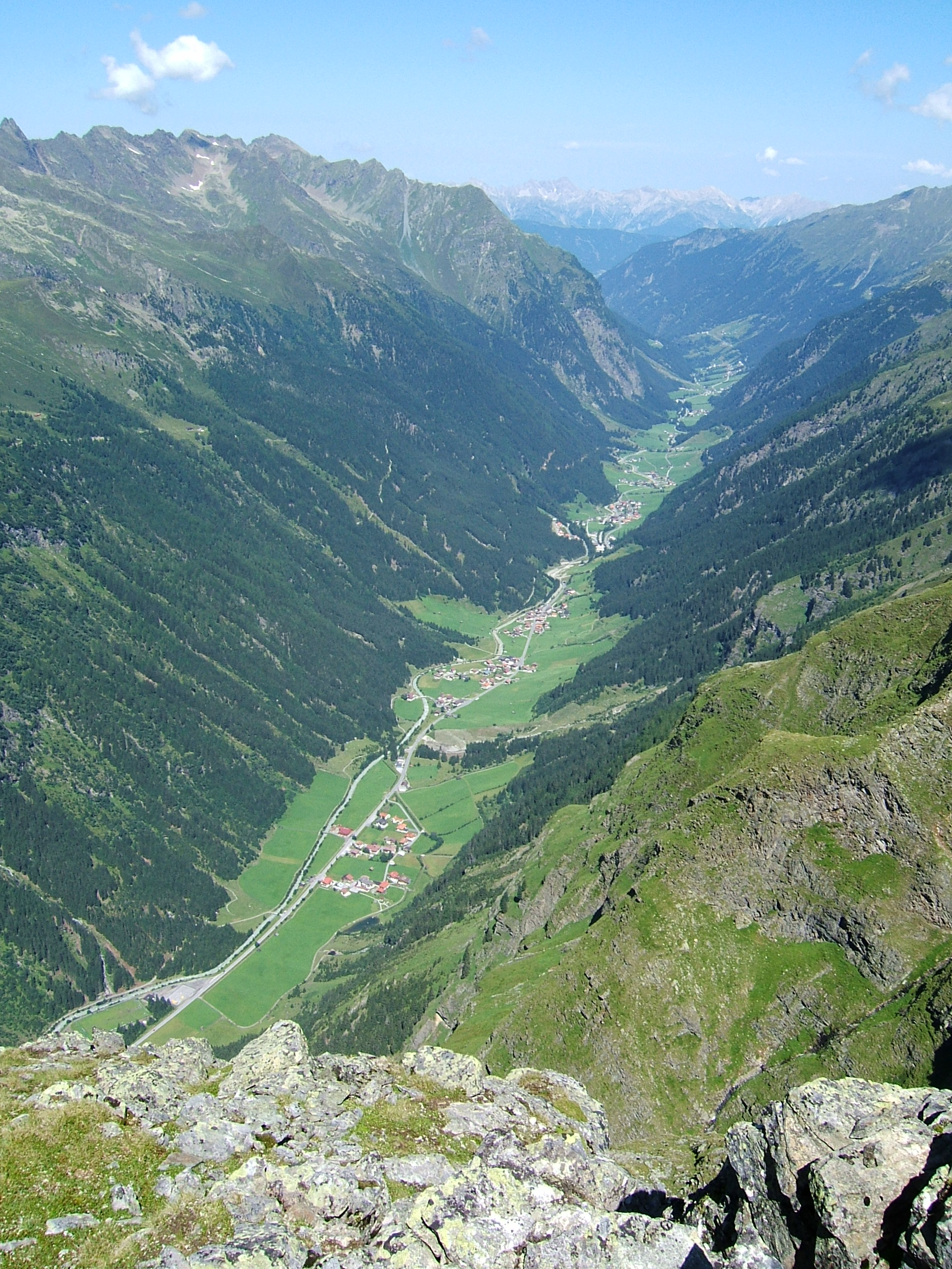 Blick auf das innere Pitztal vom Grabkogel (2651m, oberhalb des Moalandsees) Richtung Norden